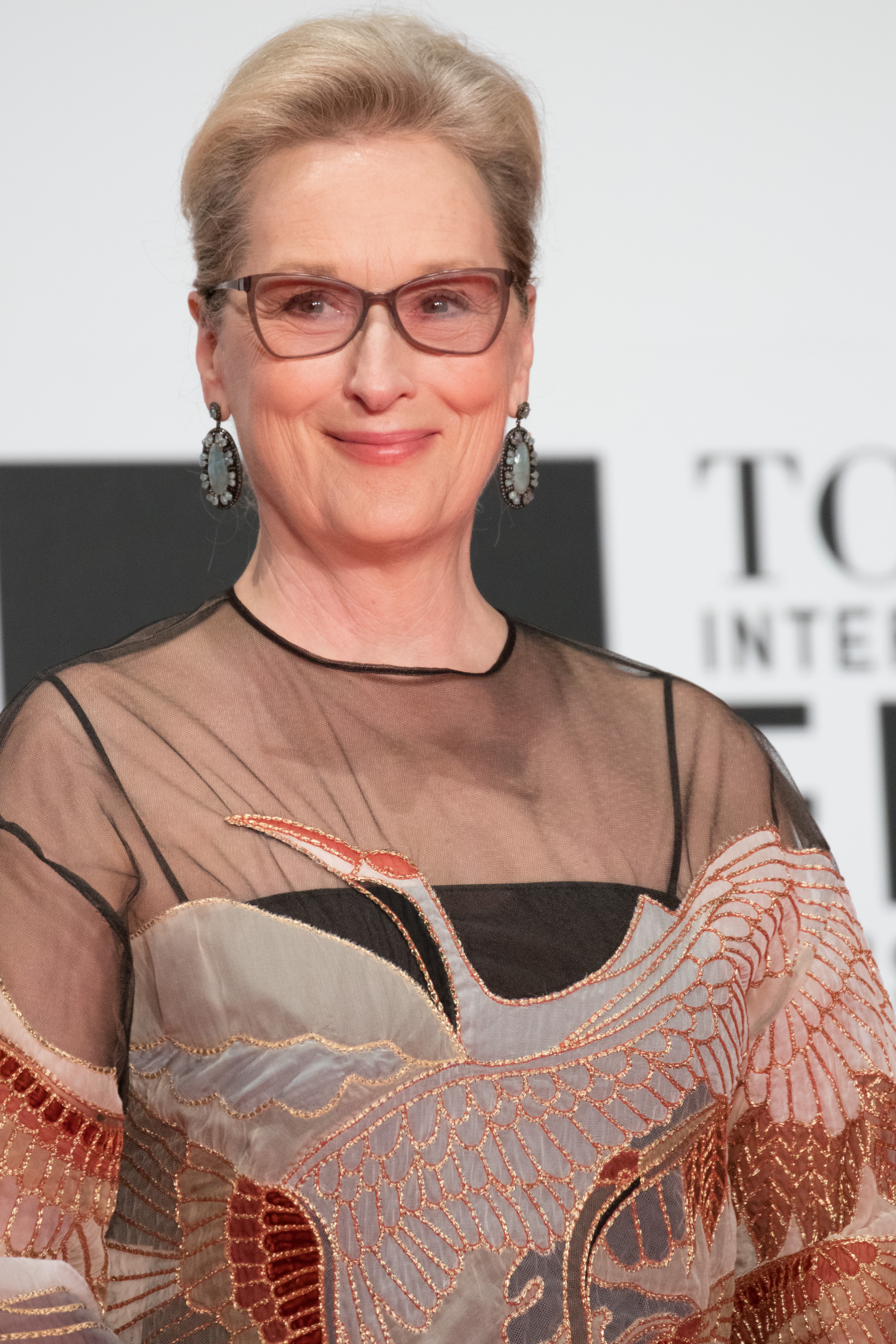 第29回 東京国際映画祭 オープニングセレモニー メリル・ストリープ (マダム・フローレンス! 夢見るふたり)